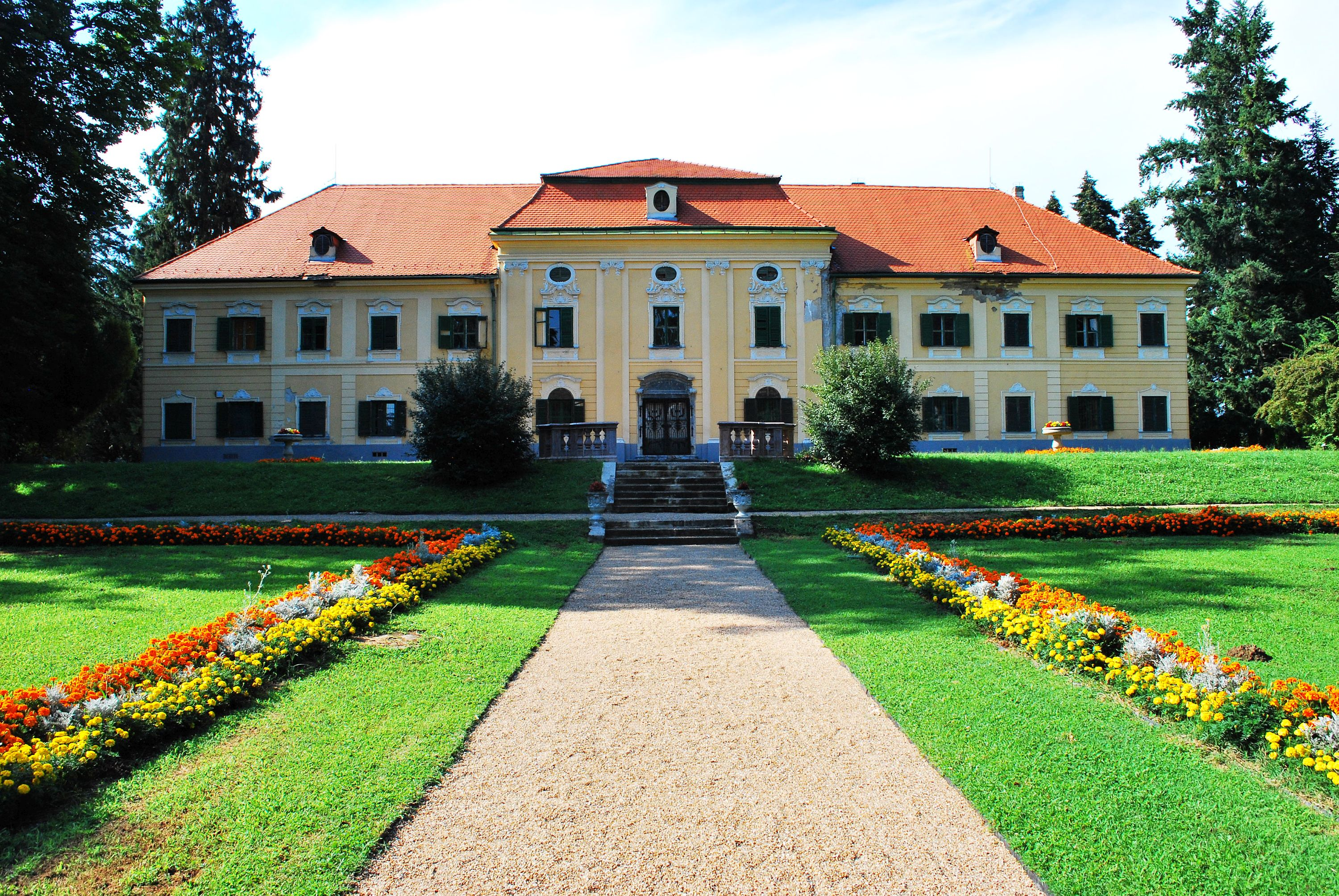 Sellyei Draskovich-kastély